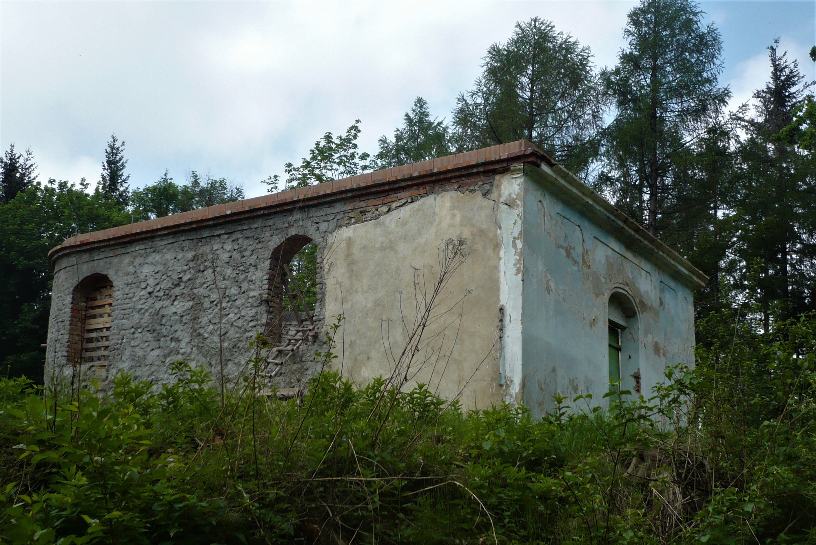 Złoty Stok